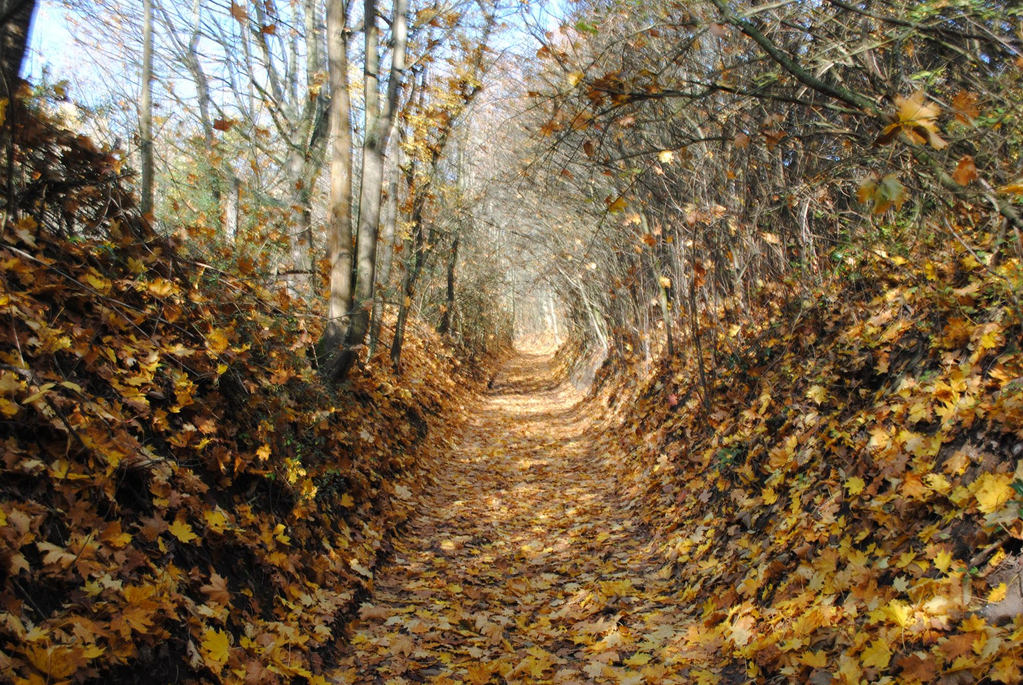 Hohlweg in Bad Frankenhausen, genannt Blutrinne. Der Weg beginnt gegenüber dem Friedhof in Bad Frankenhausen und endet auf dem Weißen Berg